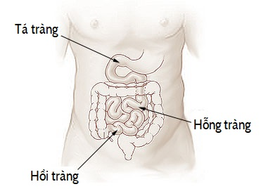 Ruột non ở người